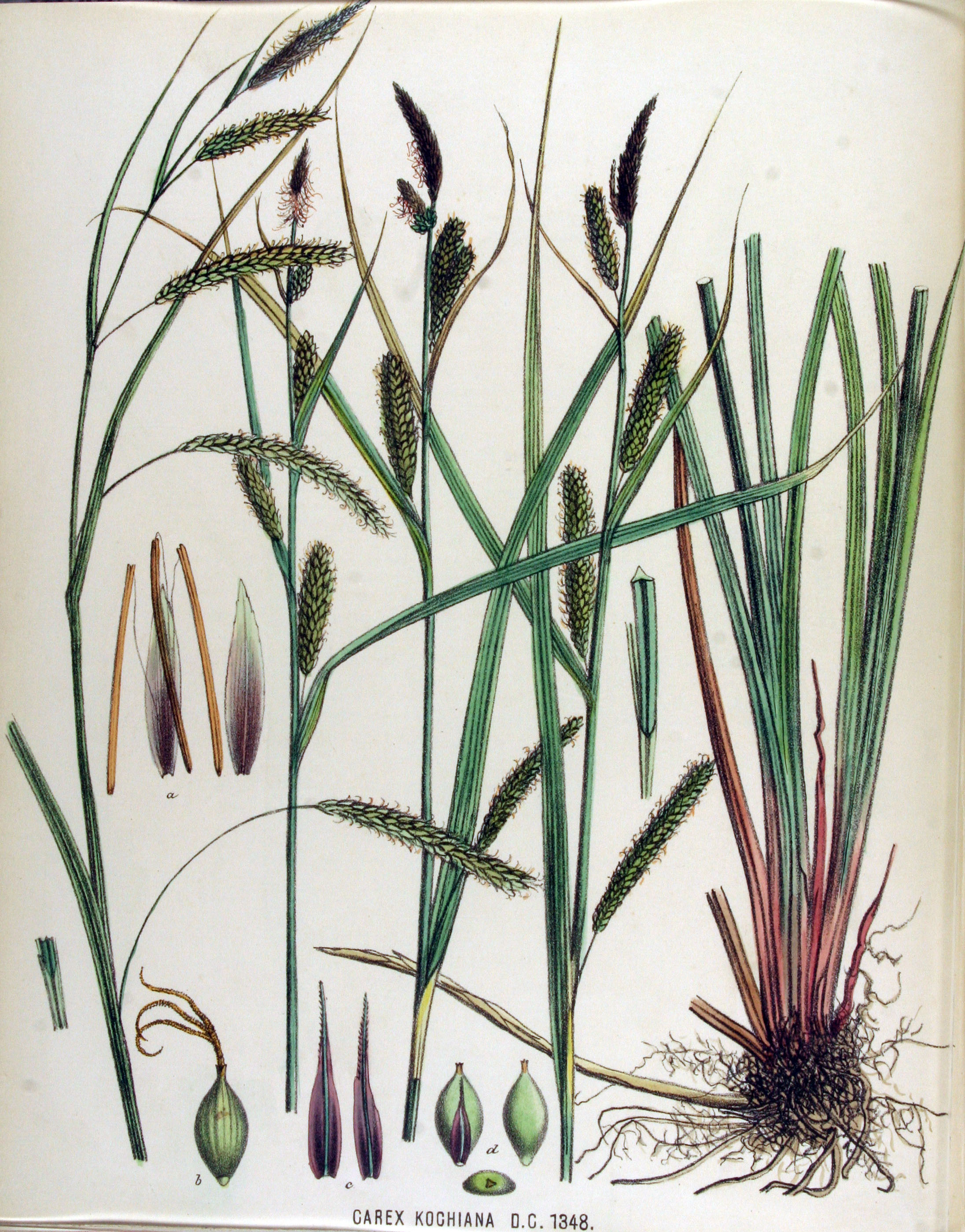 Carex acutiformis Ehrh. (Syn. Carex kochiana DC.)